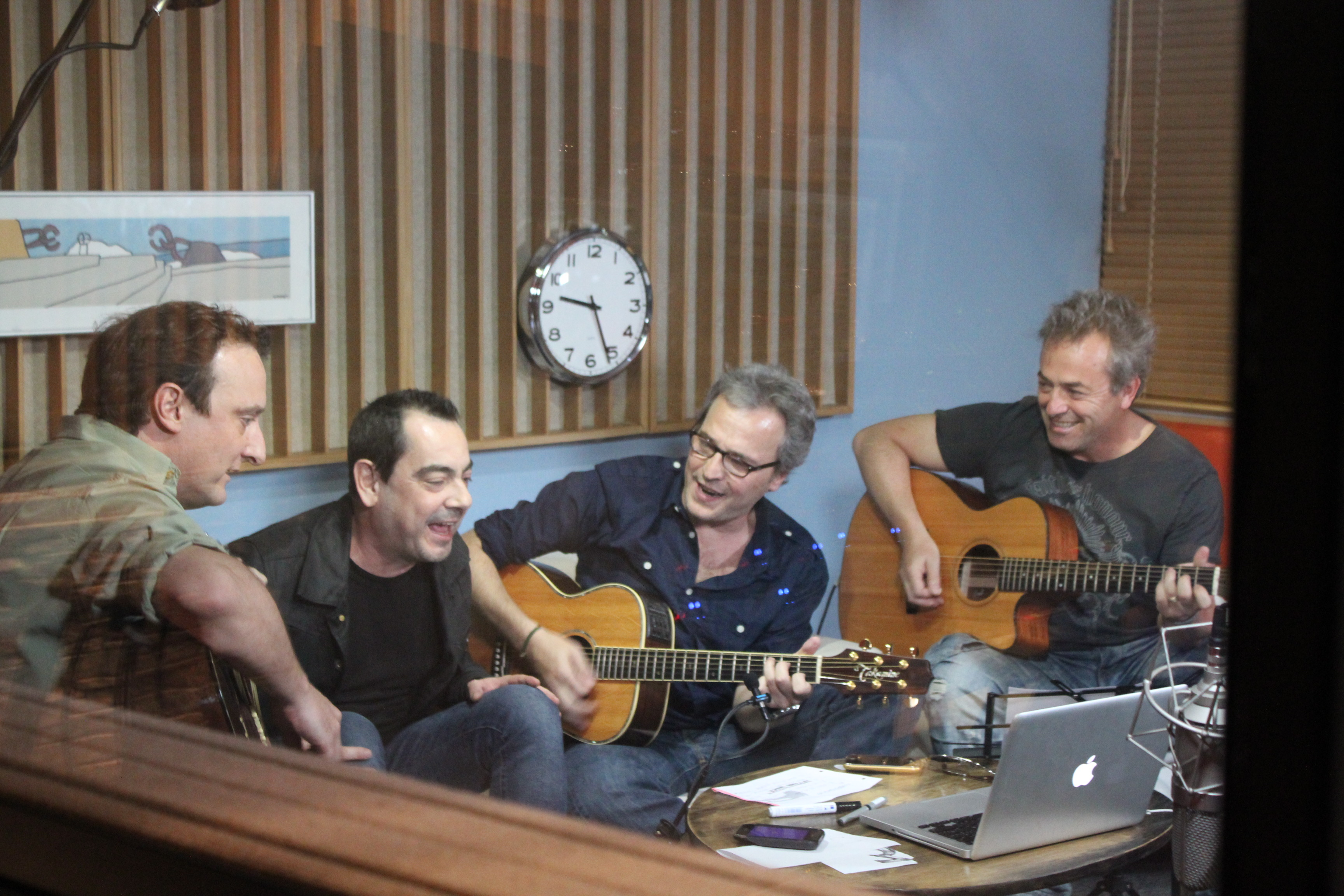 Hombres G en el estudio cantando